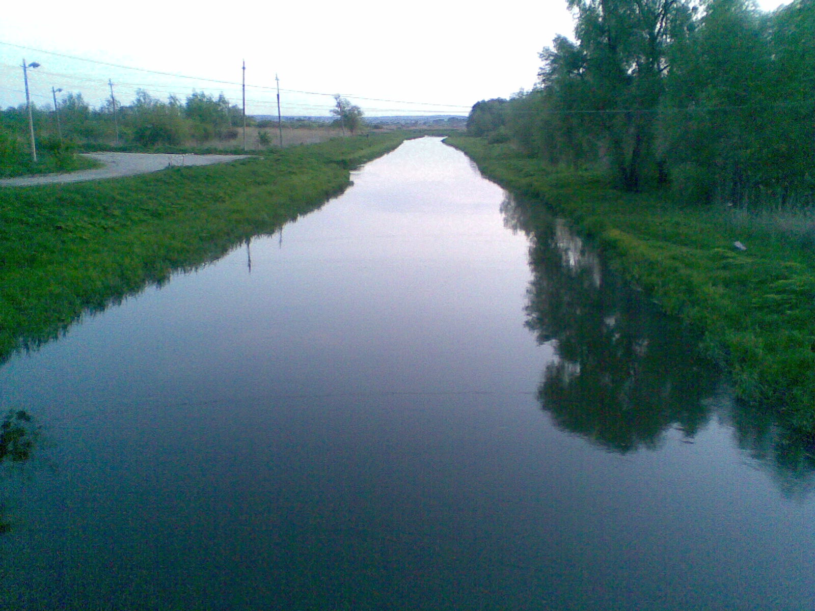 Іква (річка)